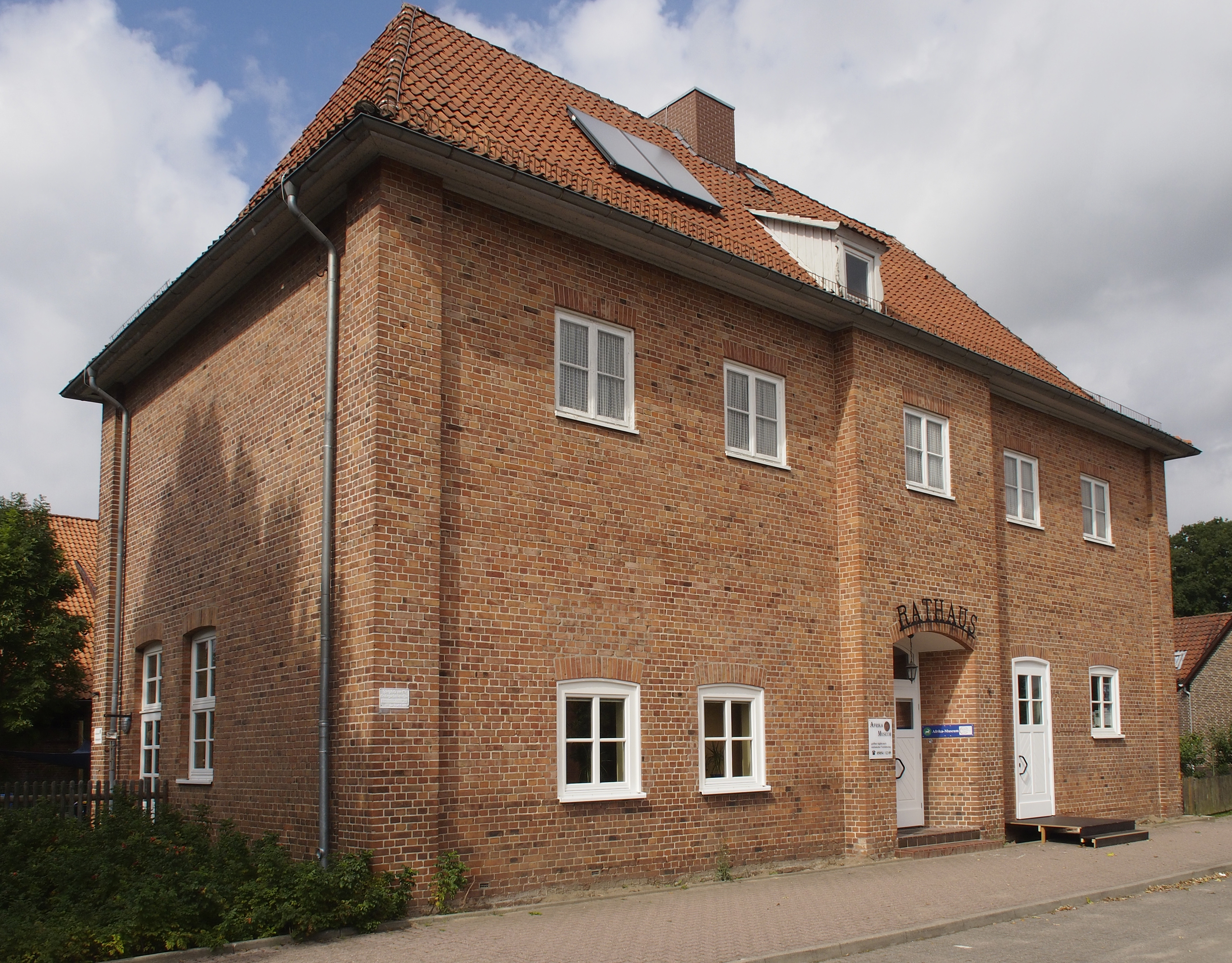 Altes Rathaus von Sülze, beherbergt jetzt das Afrika-Museum